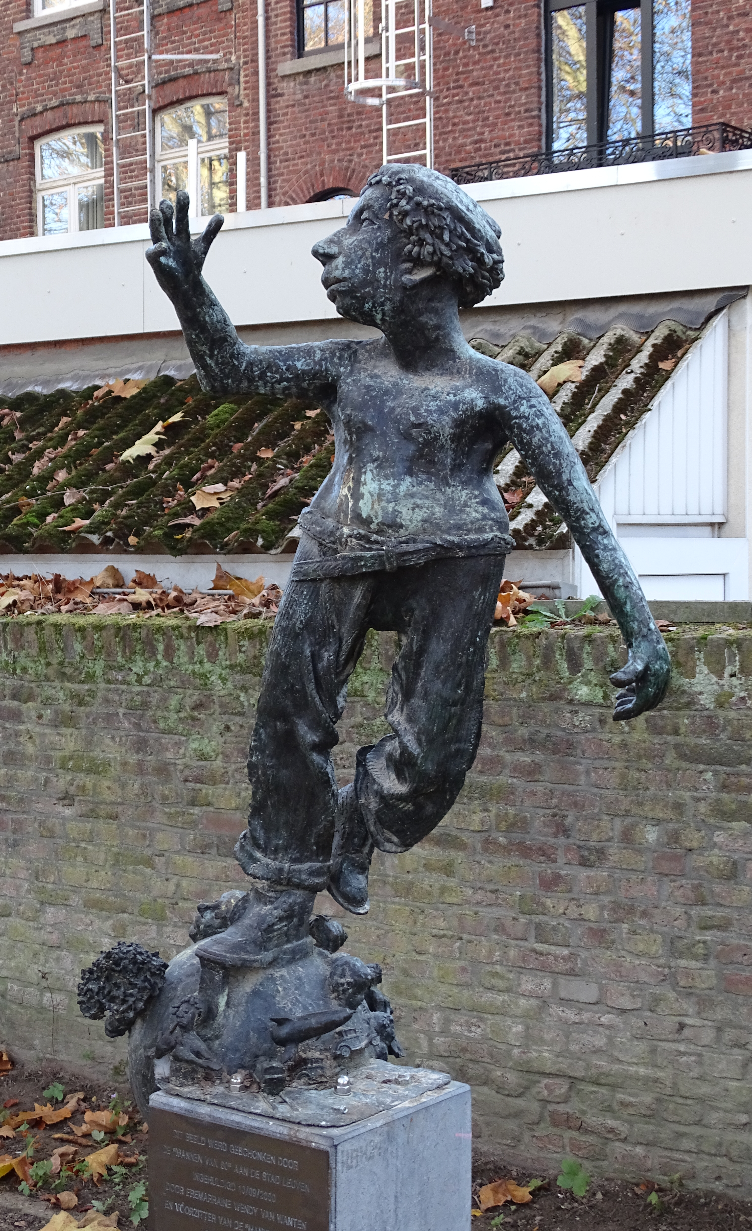 Jan Rosseels, Kamerood sesteg (2000) in het Sint-Donatuspark te Leuven. Kamerood sesteg is de symbolische benaming voor een Leuevense man die 40 wordt en tot de "Mannen van het Jaar" toetreedt.